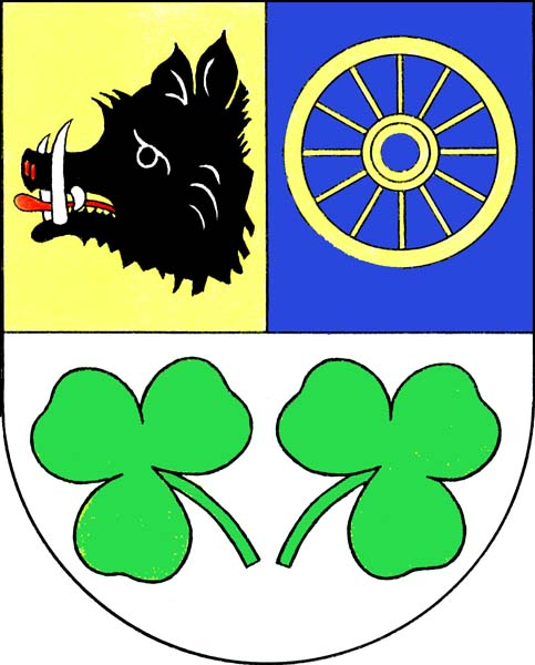 Březí (ST), znak. Dělený štít, horní polovina zlato-modře polcená; vpravo černá kančí hlava, vlevo zlaté vozové kolo. V dolní stříbrné polovině dva zelené odvrácené trojlístky jetele.